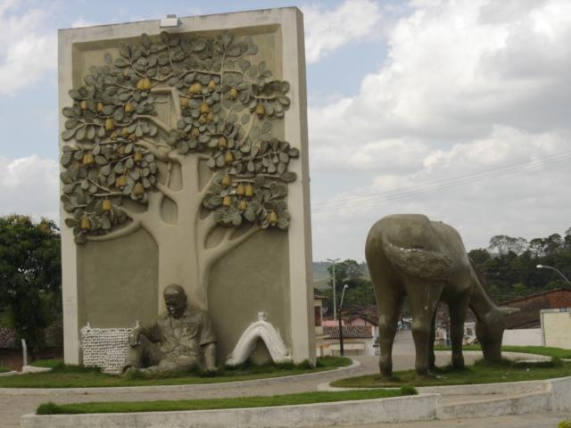 Acesso a Cajueiro